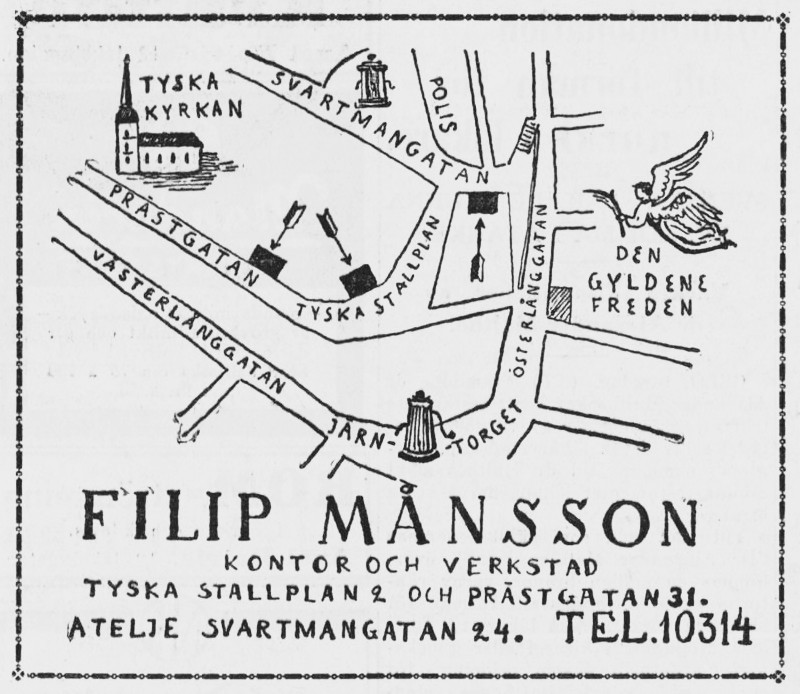 Tidningsreklam för Filip Månssons målerifirma